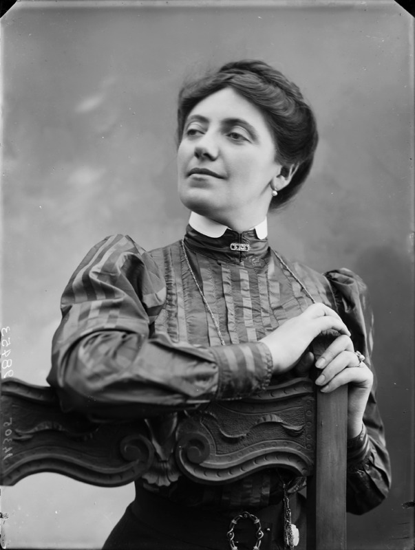 Solomiya Krushelnytska fotografata da Mario Nunes Vais